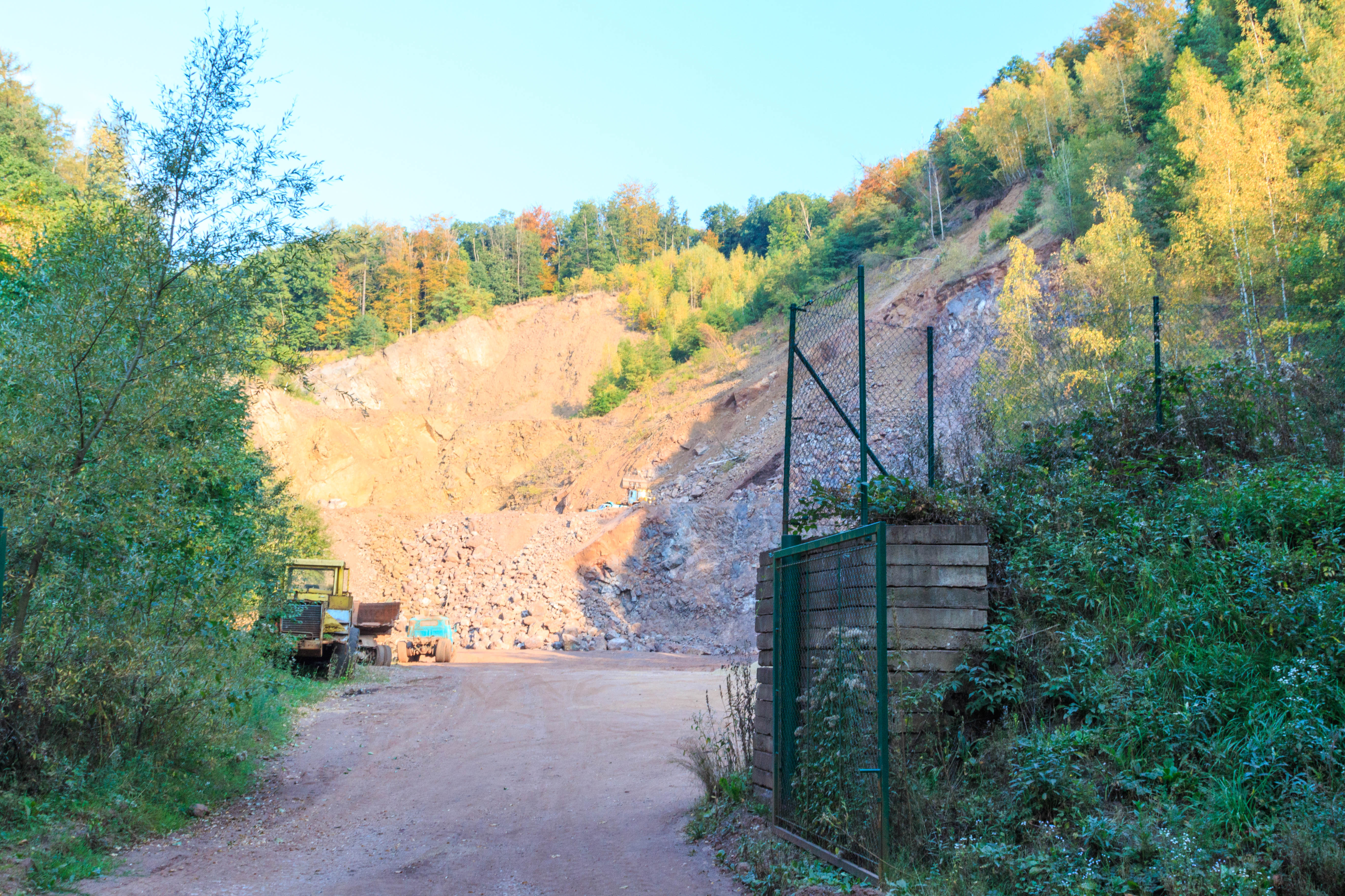 Doubravický kamenolom